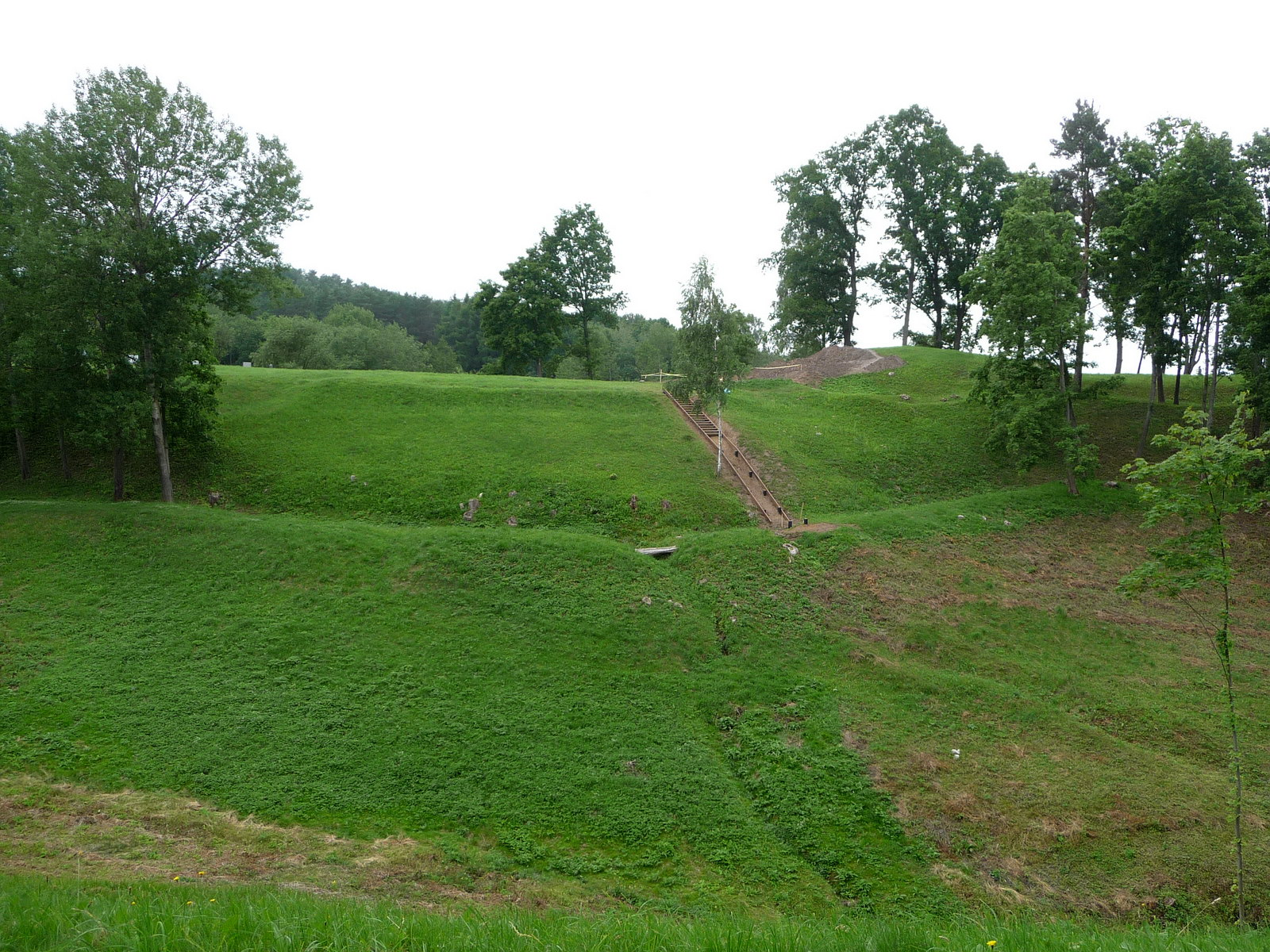 "Žydkapiai" (Grinaičių piliakalnis)